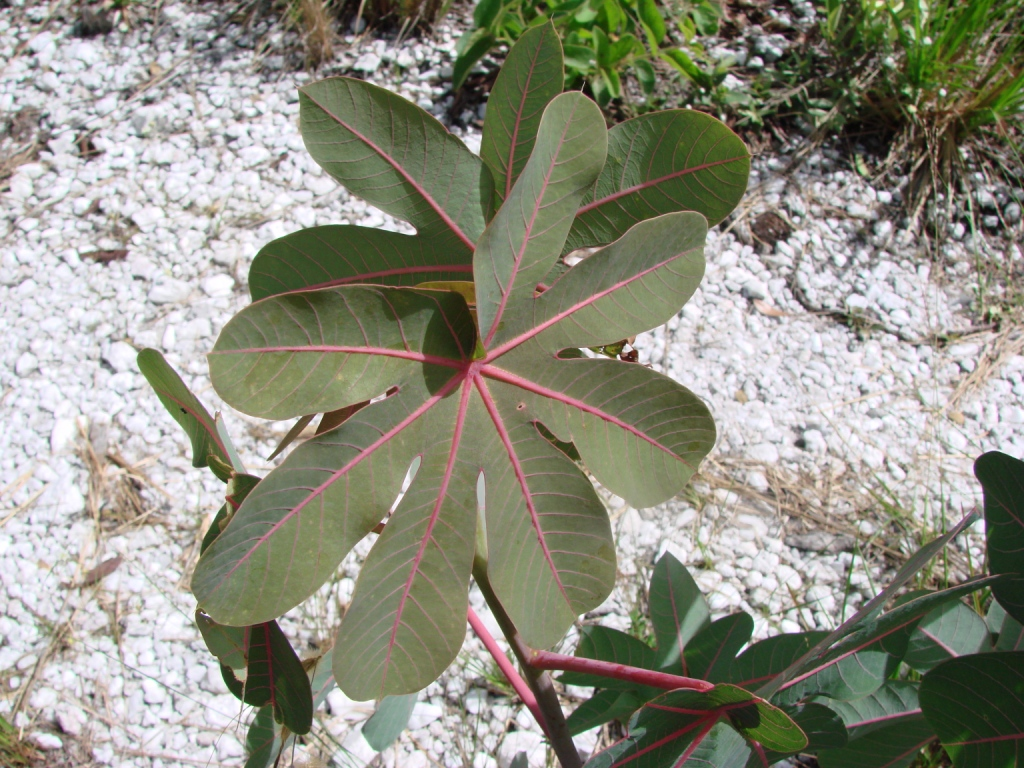 Manihot peltata - EUPHORBIACEAE Parque Nacional da Chapada dos Veadeiros - Cavalcante - Goiás - Brasil.